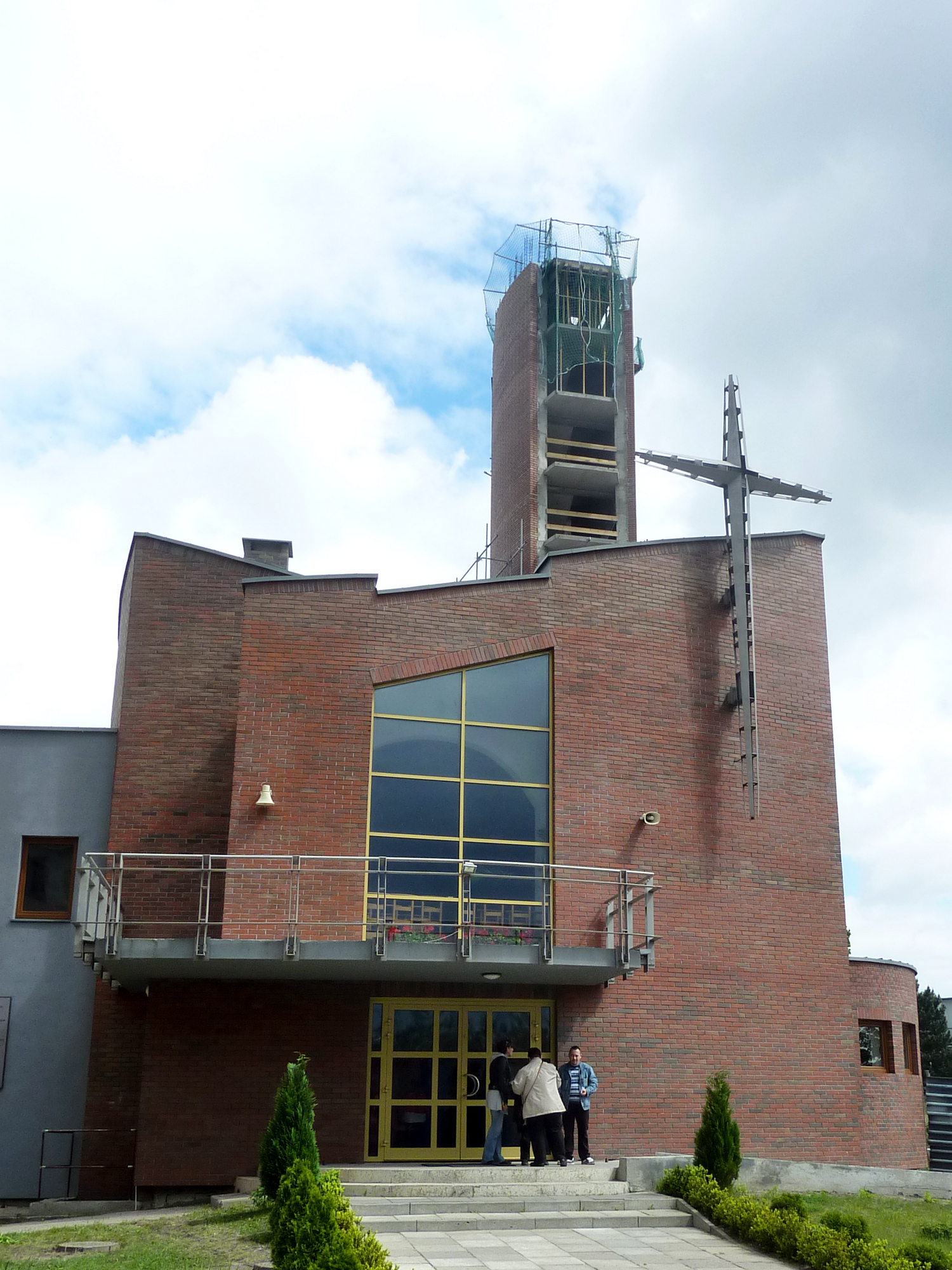 Kościół Matki Bożej Fatimskiej i Sanktuarium Męczeństwa bł. ks. Jerzego Popiełuszki we Włocławku.